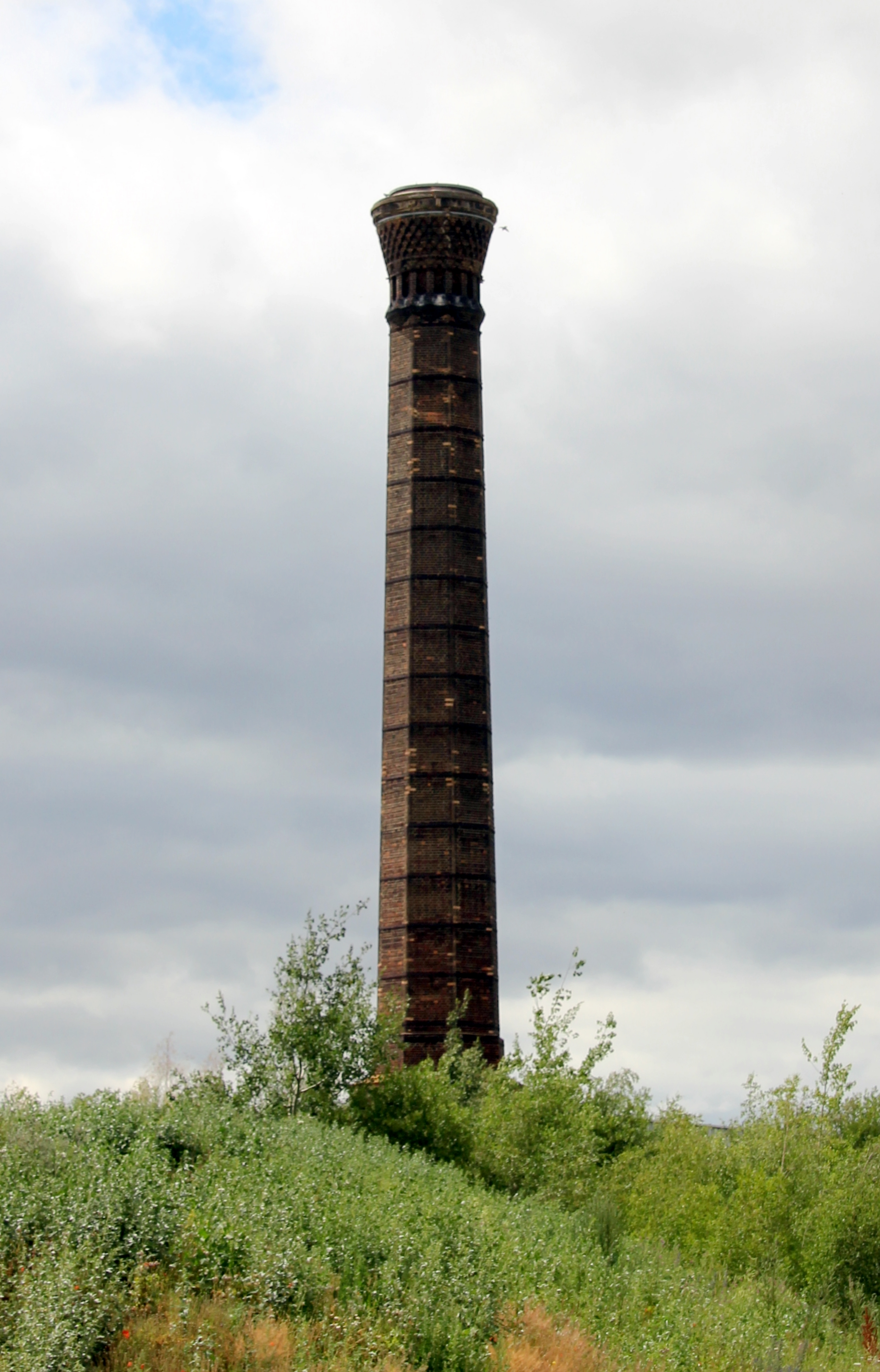 Schornstein Hauptstraße Schackensleben